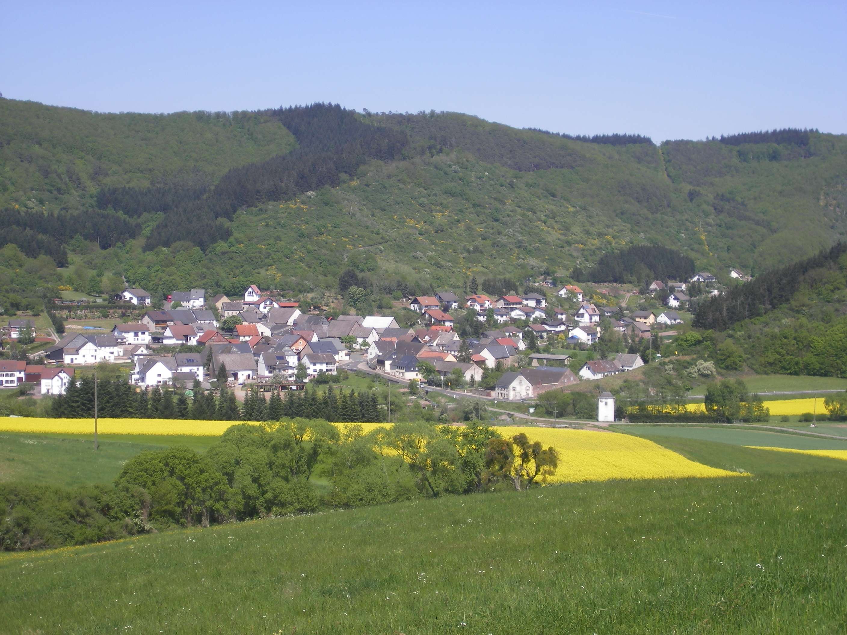 Heimweiler, Rhineland-Palatinate